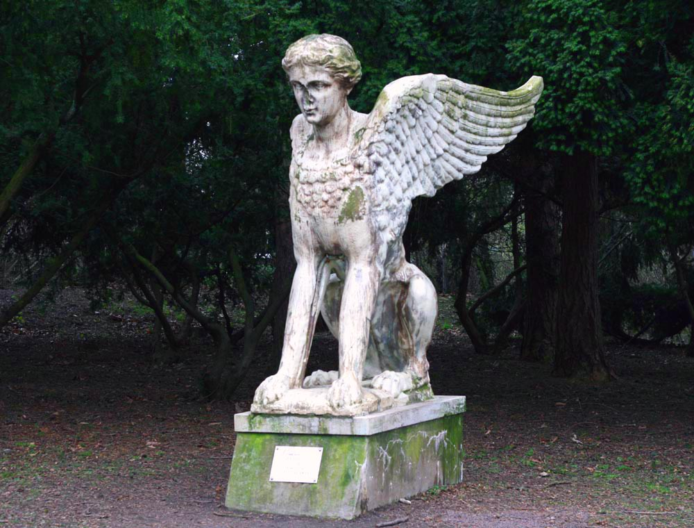 Sfinx från Lunds Universitet, i Botaniska trädgården. Den här sfinxen saknar näsa och höger vinge.